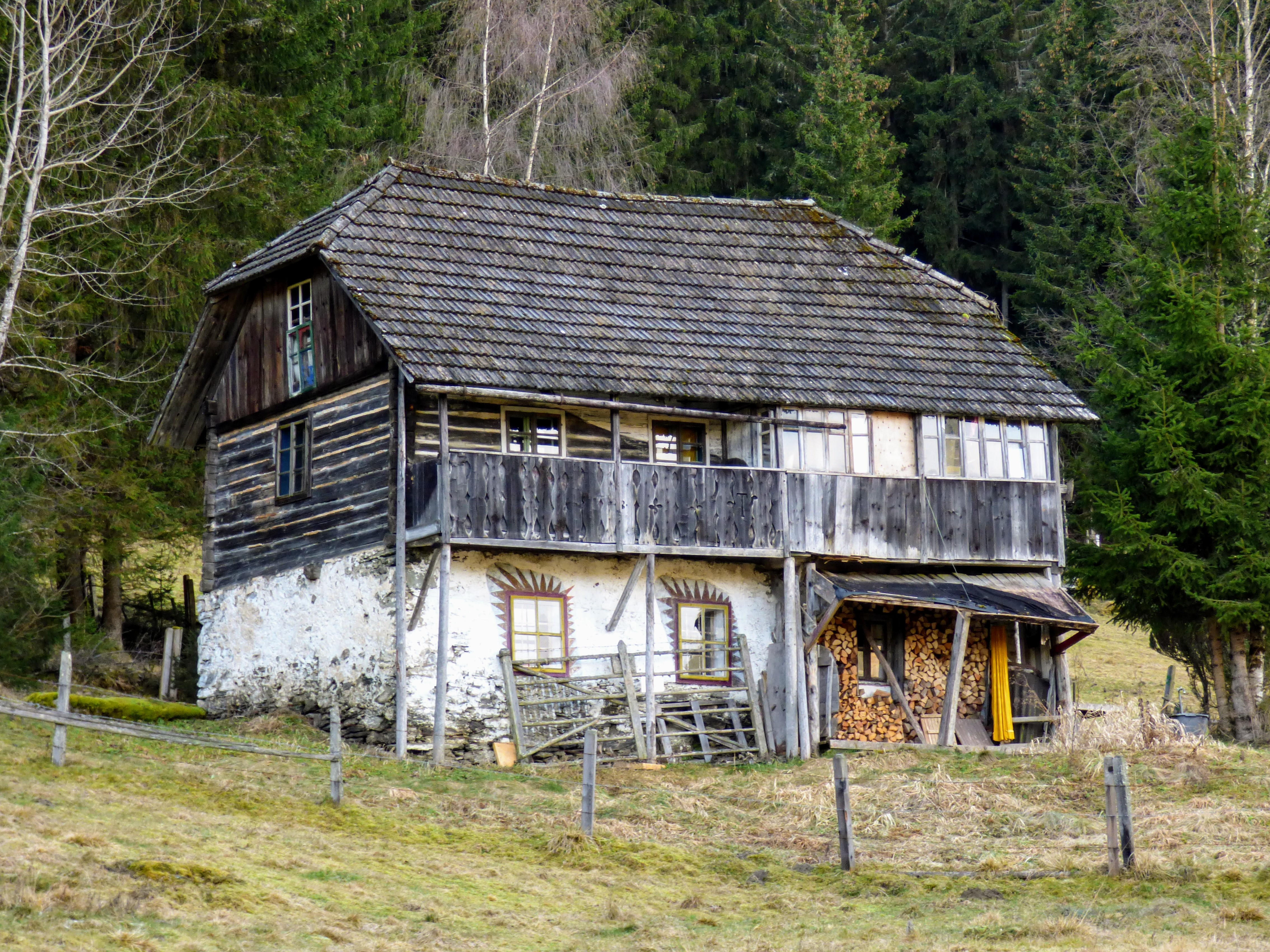 Gößeberg Haus Nr. 6 Gemeinde Liebenfels, Kärnten